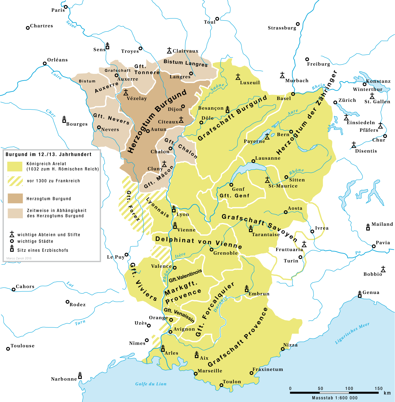 Das Königreich Arelat im Heiligen Römischen Reich und das Herzogtum Burgund im Königreich Frankreich im 12./13. Jahrhundert